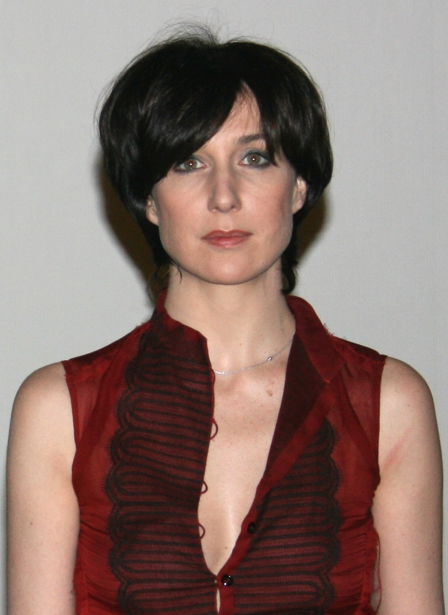 Elsa Zylberstein à l'avant-première de La Fabrique des sentiments diffusée à l'UGC Ciné Cité Les Halles, à Paris.